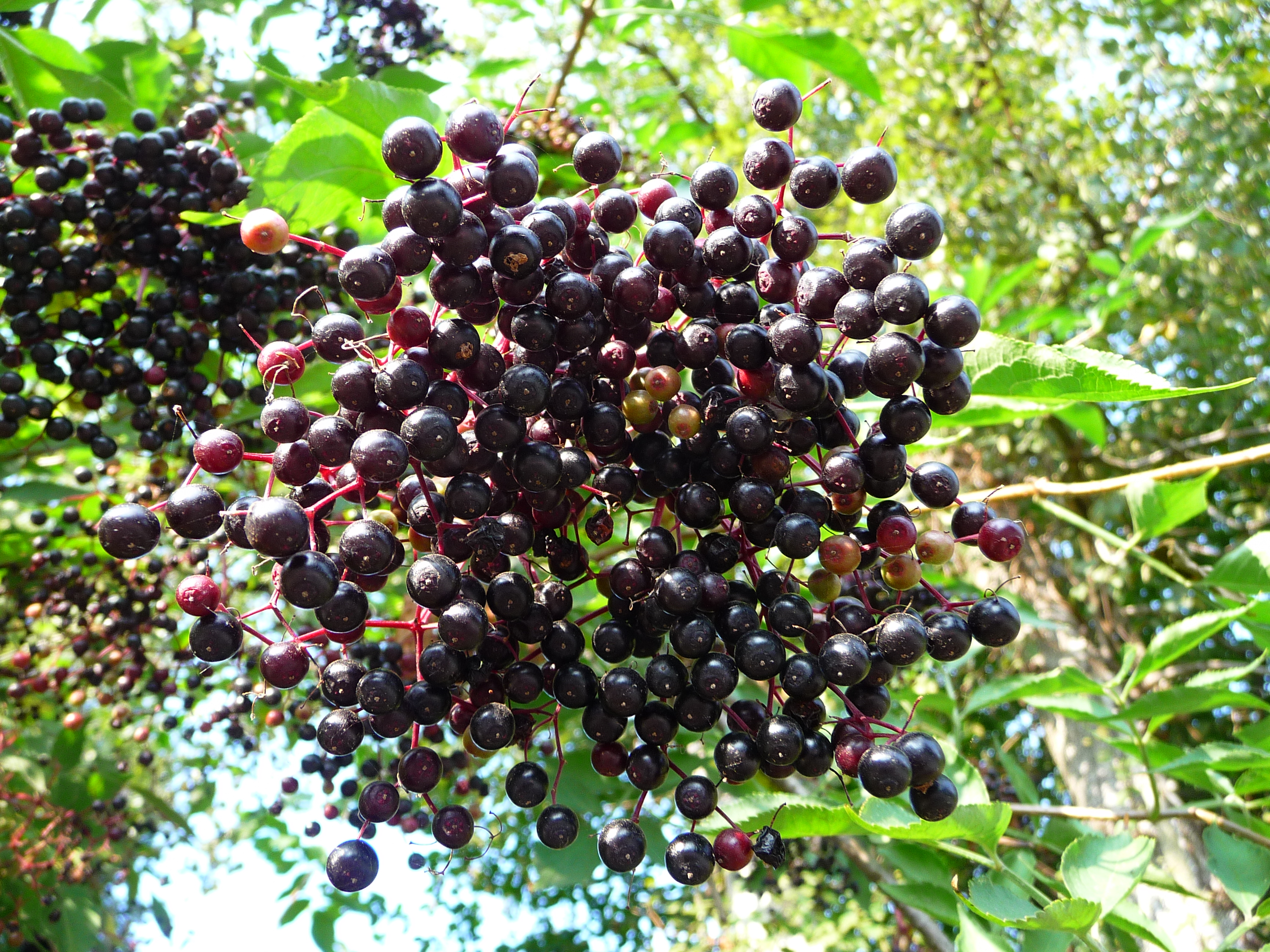 Reife Früchte des Schwarzen Holunder (Sambucus nigra), fotografiert in Heidelberg (Baden-Württemberg, Deutschland)